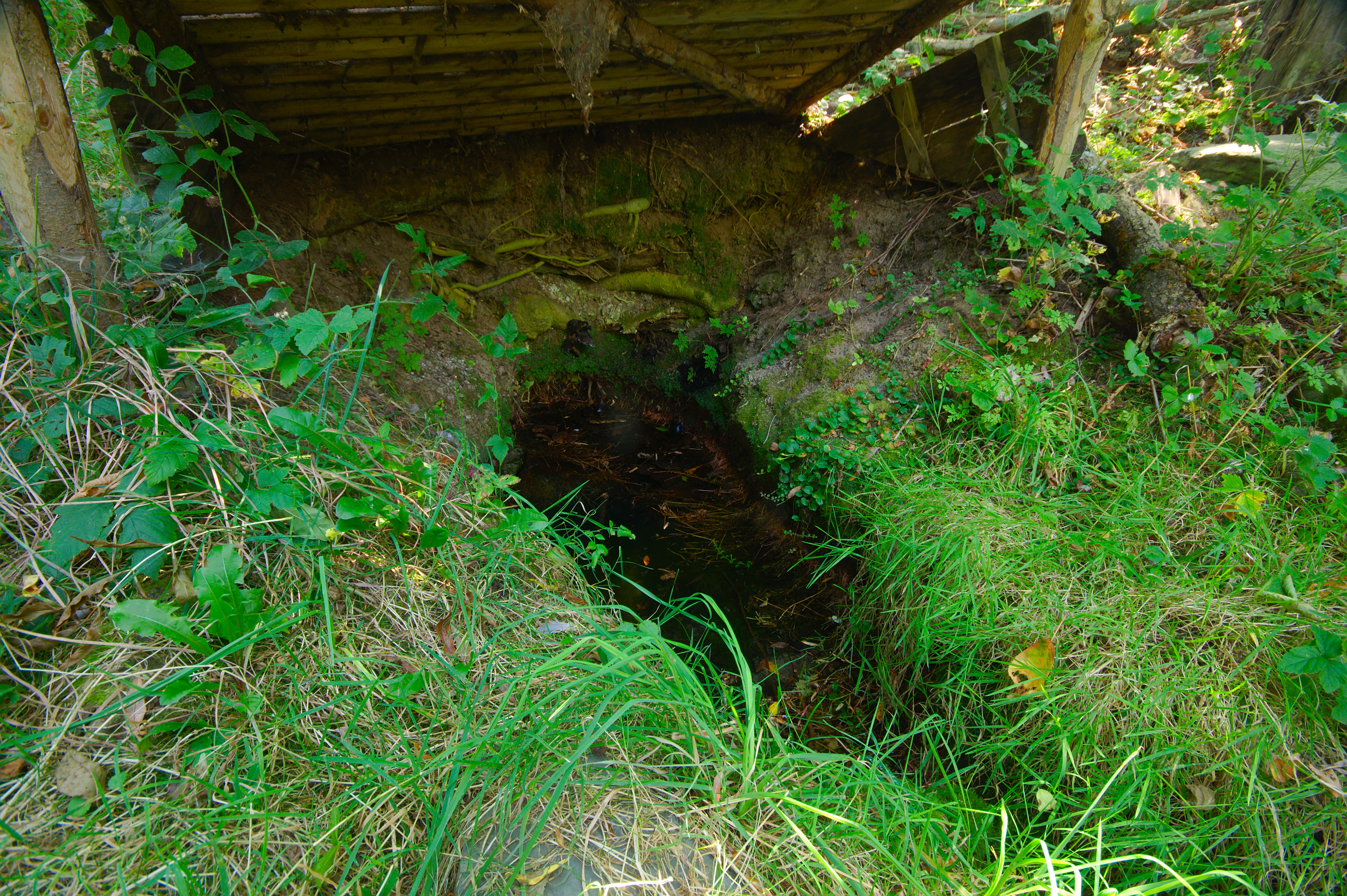 Pramen Lešanského potoka, Ohrozim, okres Prostějov